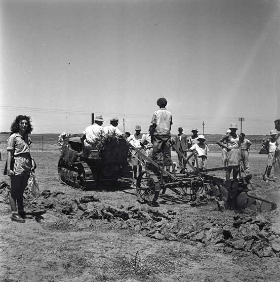 בצרה - חגיגת העליה לבצרה - ארגון שתופי לחיילים משוחררים - חריש ראשון.